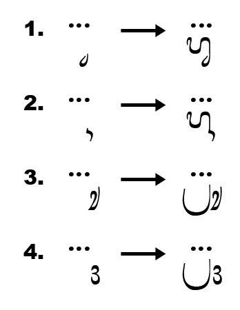 Beberapa contoh perubahan bentuk suku dalam aksara Bali.